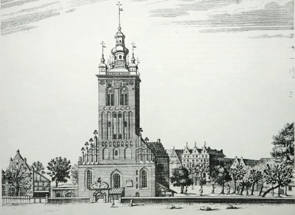 Gdańsk Stare Miasto, ul. Podmłyńska 10 / ul. Profesorska 3 - rzymskokatolicki kościół rektorski ojców karmelitów, p.w. św. Katarzyny Aleksandryjskiej, 1230, 1336-80, 1945.